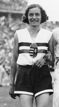 Factual corrections and alternative descriptions are encouraged separately from the original description. Additionally errors can be reported at this page to inform the Bundesarchiv. Original historic description: Berlin, Olympiade, Hochsprung der Damen Scherl Das sind die besten Hochspringerinnen der Welt Zwischen den Staffelkämpfen, die das Hauptprogramm des letzten Leichtathletiktages der XI. Olympischen Spiele am Sonntag bildeten, wurde mit dem Hochspringen der Frauen noch eine technische Uebung entschieden. Olympiasiegerin wurde dabei Ibolya Csak-Ungarn (links), Dorothy Odam-England errang die Silberne Medaille und die Deutsche Elfriede Kaun (Mitte) die Bronzene. Alle drei erreichten die Höhe von 1.60 m und erst der Stichkampf entschied den Sieg. Scherl Bilderdienst, Berlin 9.8.1936 Abgebildete Personen: * Kaun, Elfriede: Hochspringerin, Deutschland * Csak, Ibolya: Hochspringerin, Ungarn * Odam, Dorothy: Hochspringerin, Großbritannien